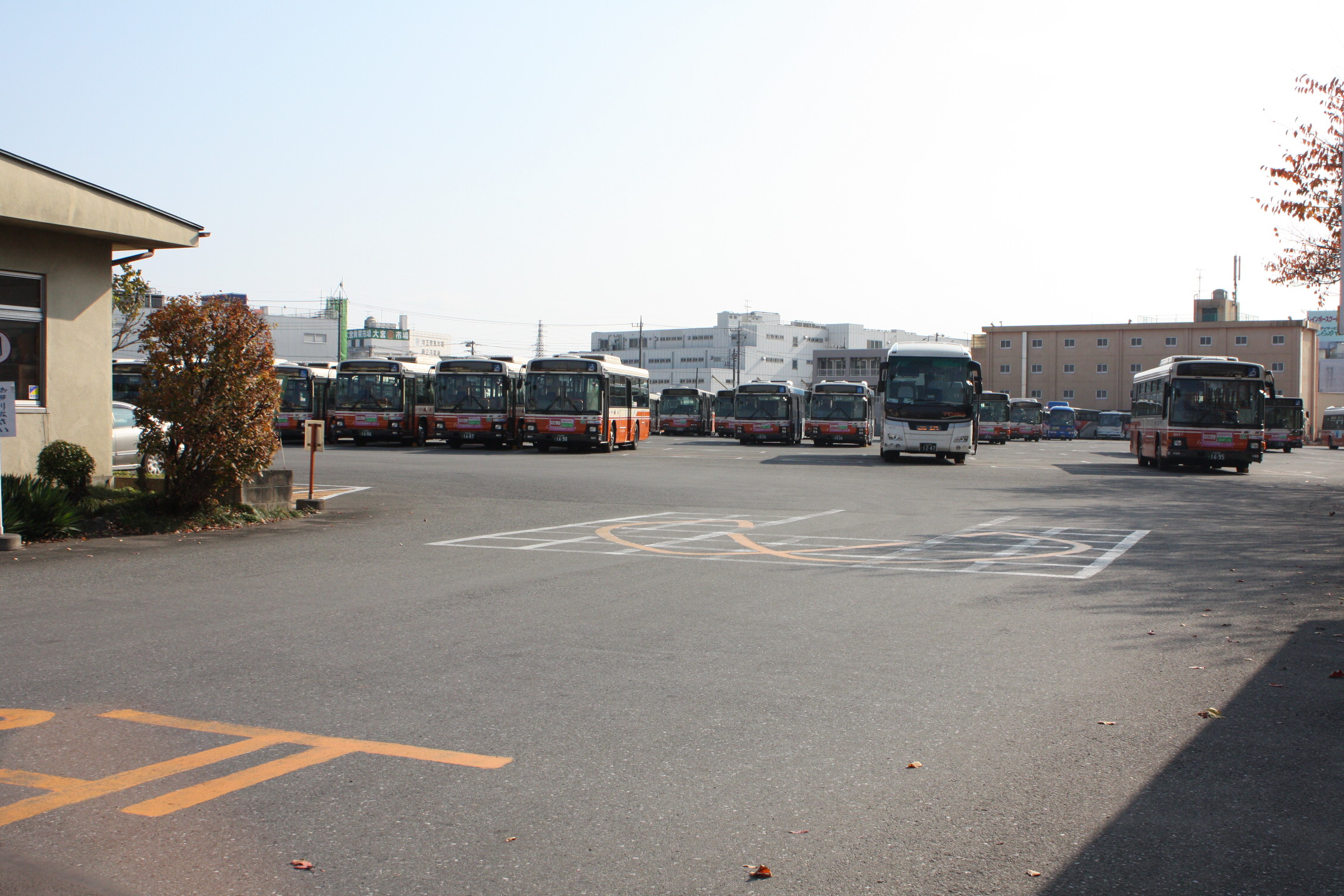 東武バスウエスト大宮営業事務所（別の角度/敷地外から撮影）